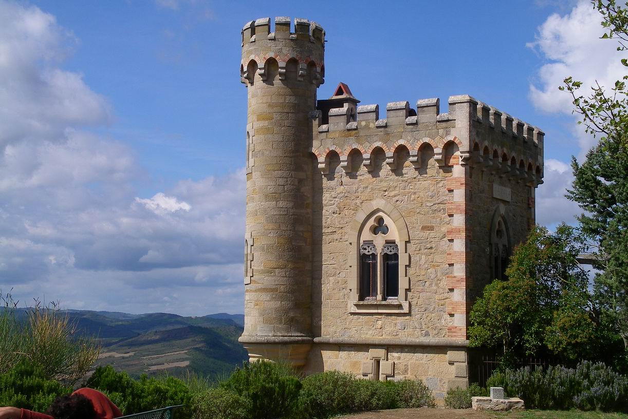 Wachturm / Rennes-le-Château